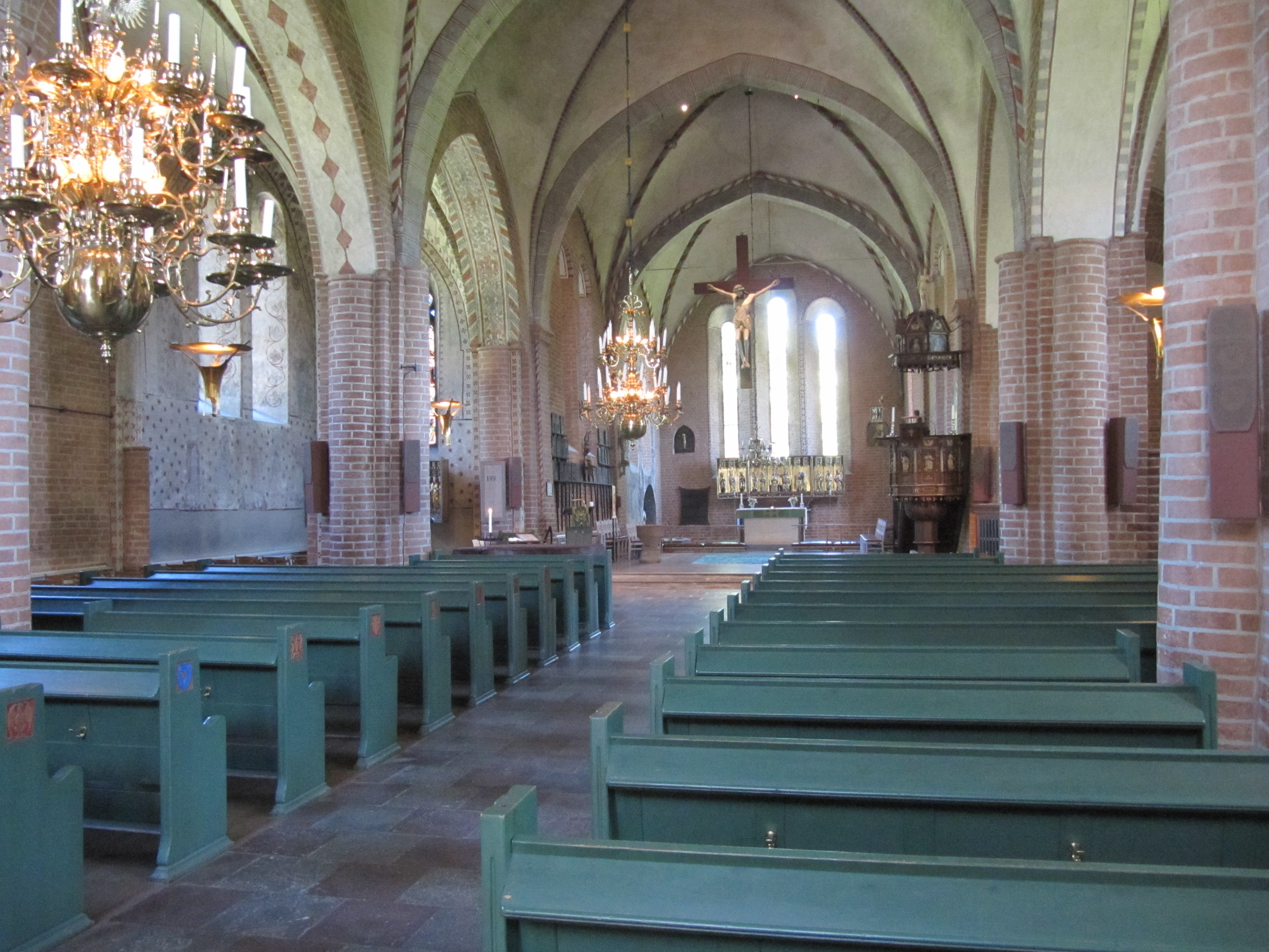 Kyrkorum i Mariakyrkan